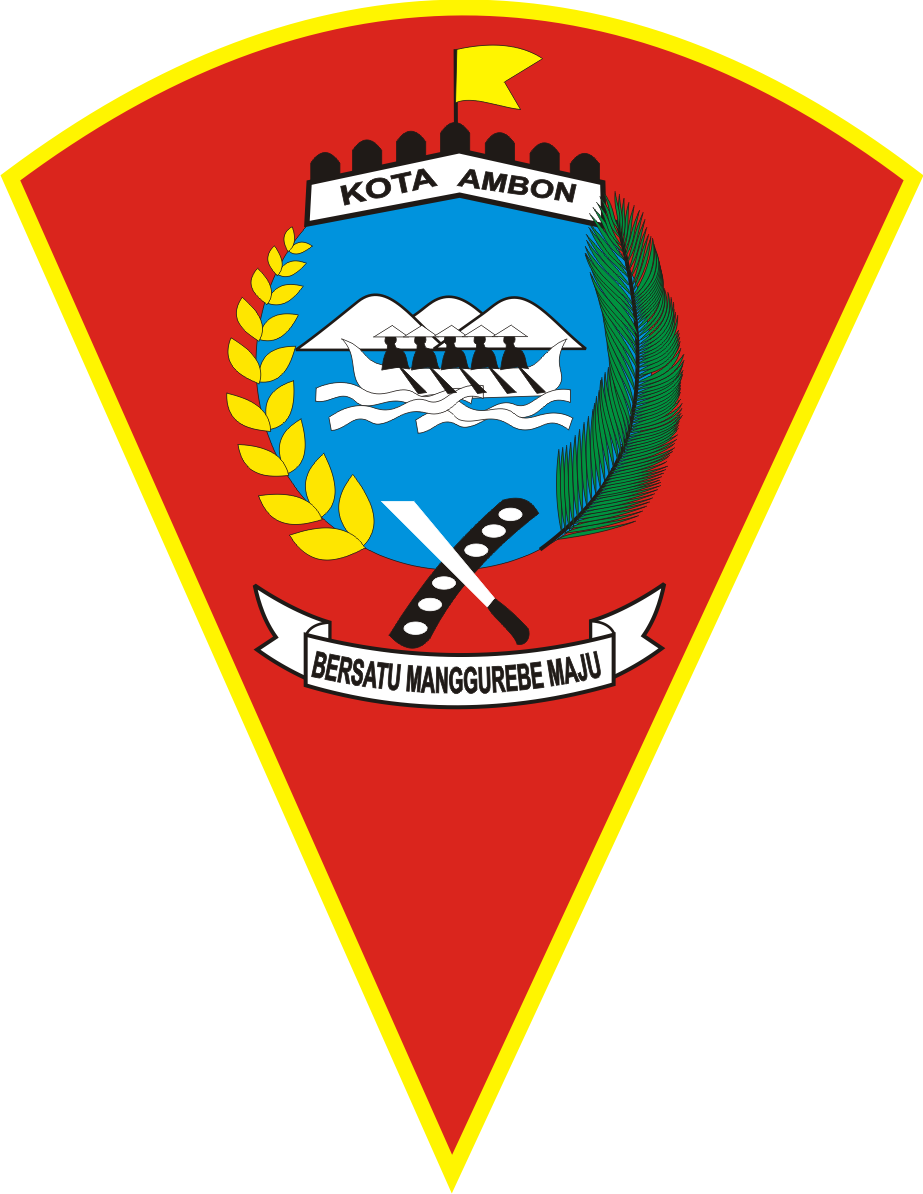 Lambang Kota Ambon, ibu kota Provinsi Maluku